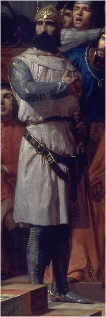 El infante Juan de Castilla el de Tarifa (1262-1319), hijo del rey Alfonso X de Castilla. Detalle del cuadro titulado María de Molina presenta a su hijo Fernando IV en las Cortes de Valladolid de 1295.